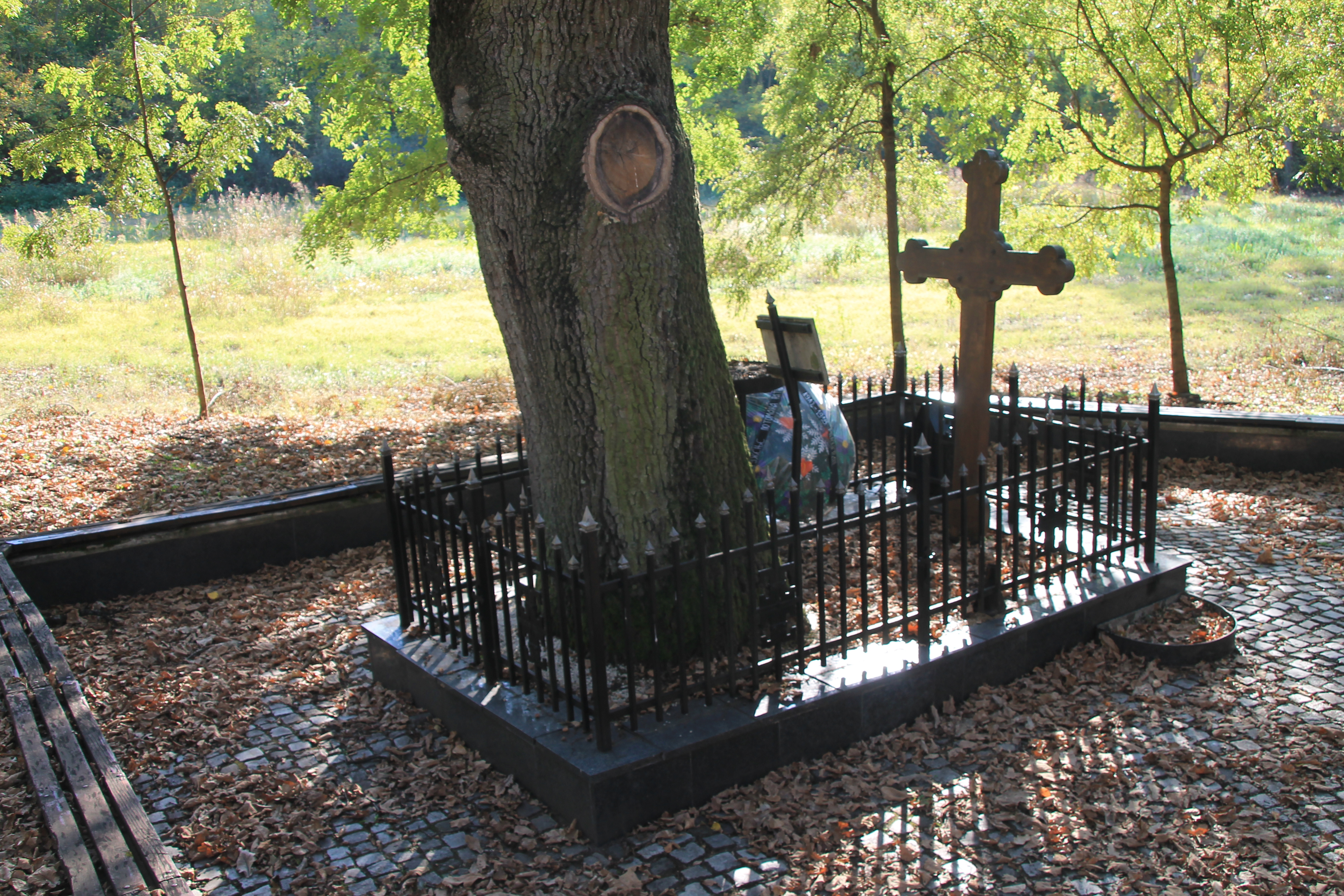 Radovanjski lug